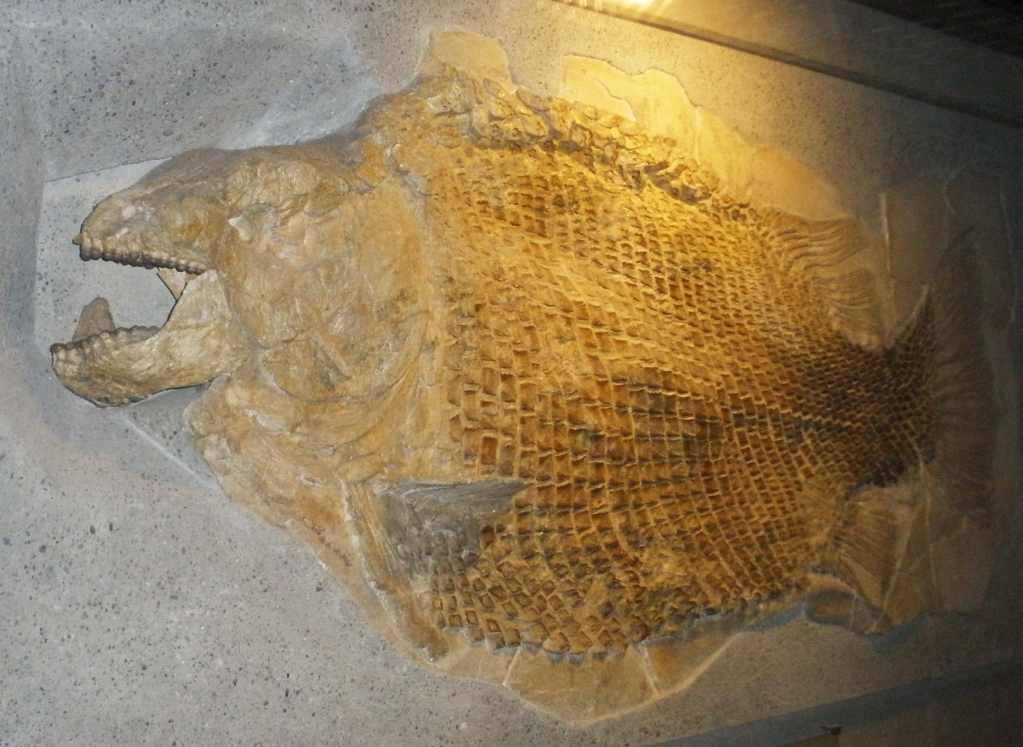 Fossil of Lepidotes, an extinct fish- Took the photo at Senckenberg Museum of Frankfurt